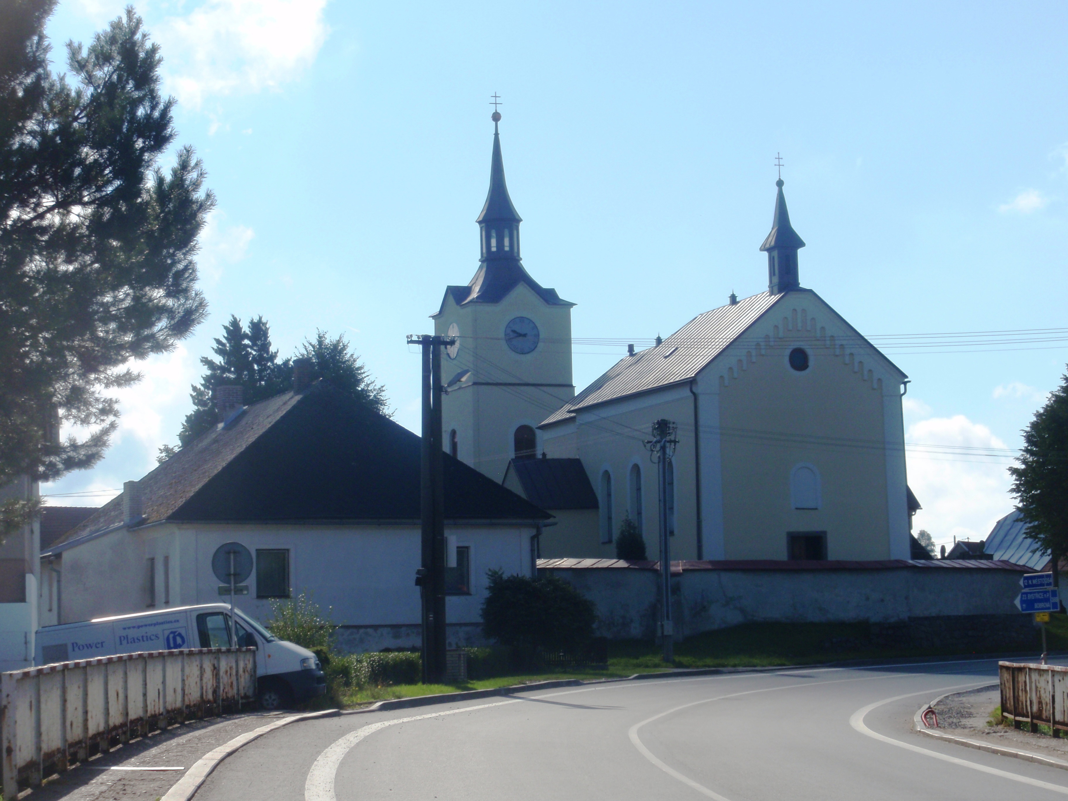 Kostel sv. Jakuba Většího (Ostrov nad Oslavou), Dolní konec, Ostrov nad Oslavou